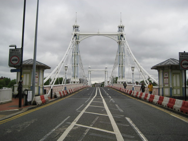 Battersea: Albert Bridge